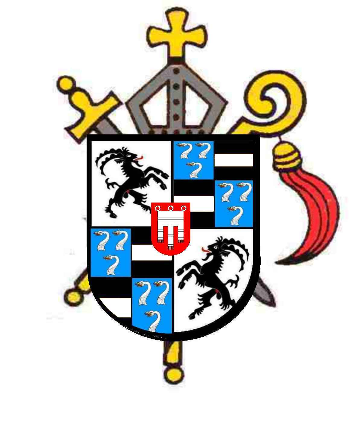 Wappen Johann VI. Flugi von Aspermont, Fürstbischof von Chur 1636-1661